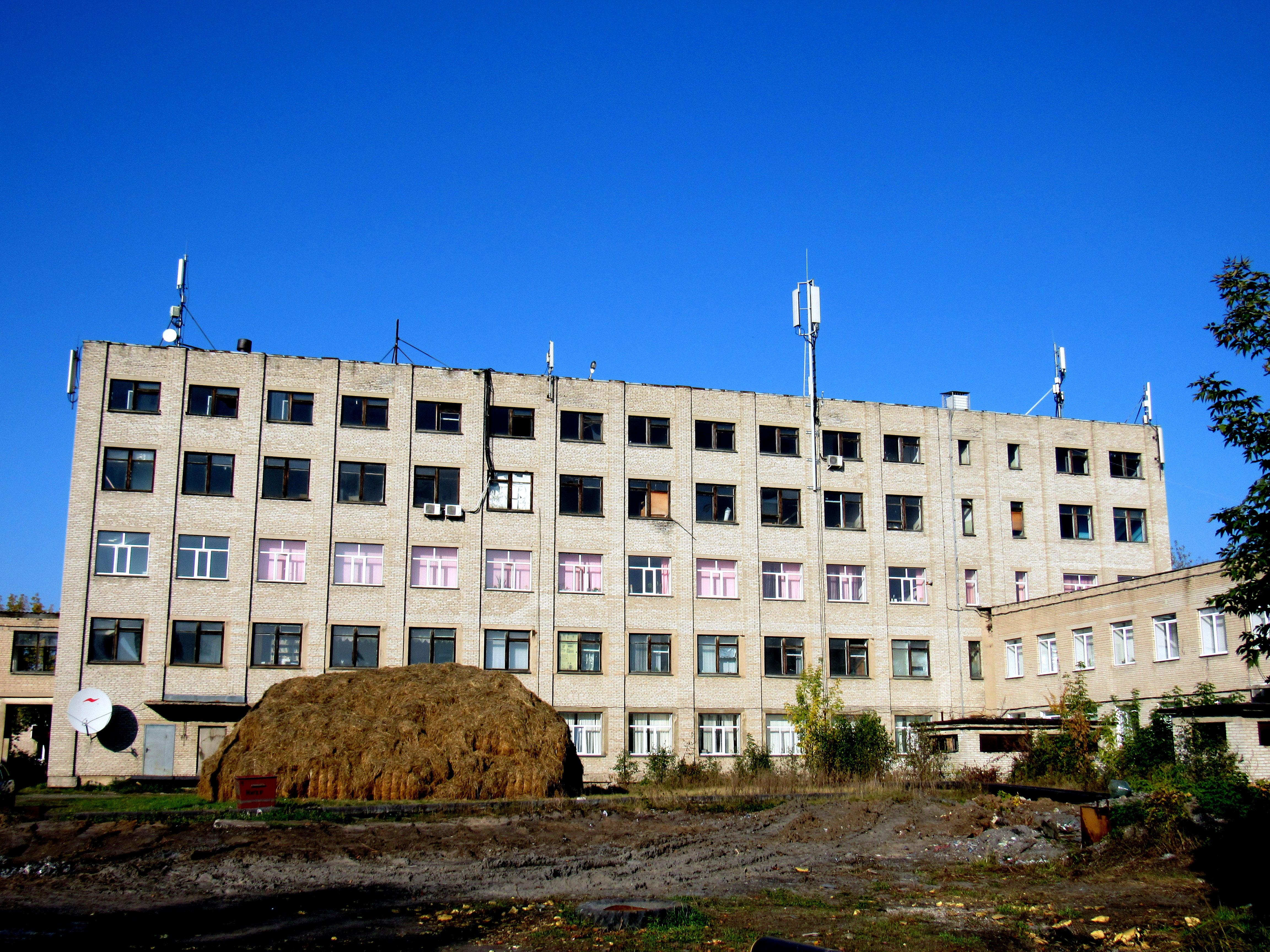 Фотография современного состояния главного корпуса СевНИИЖ